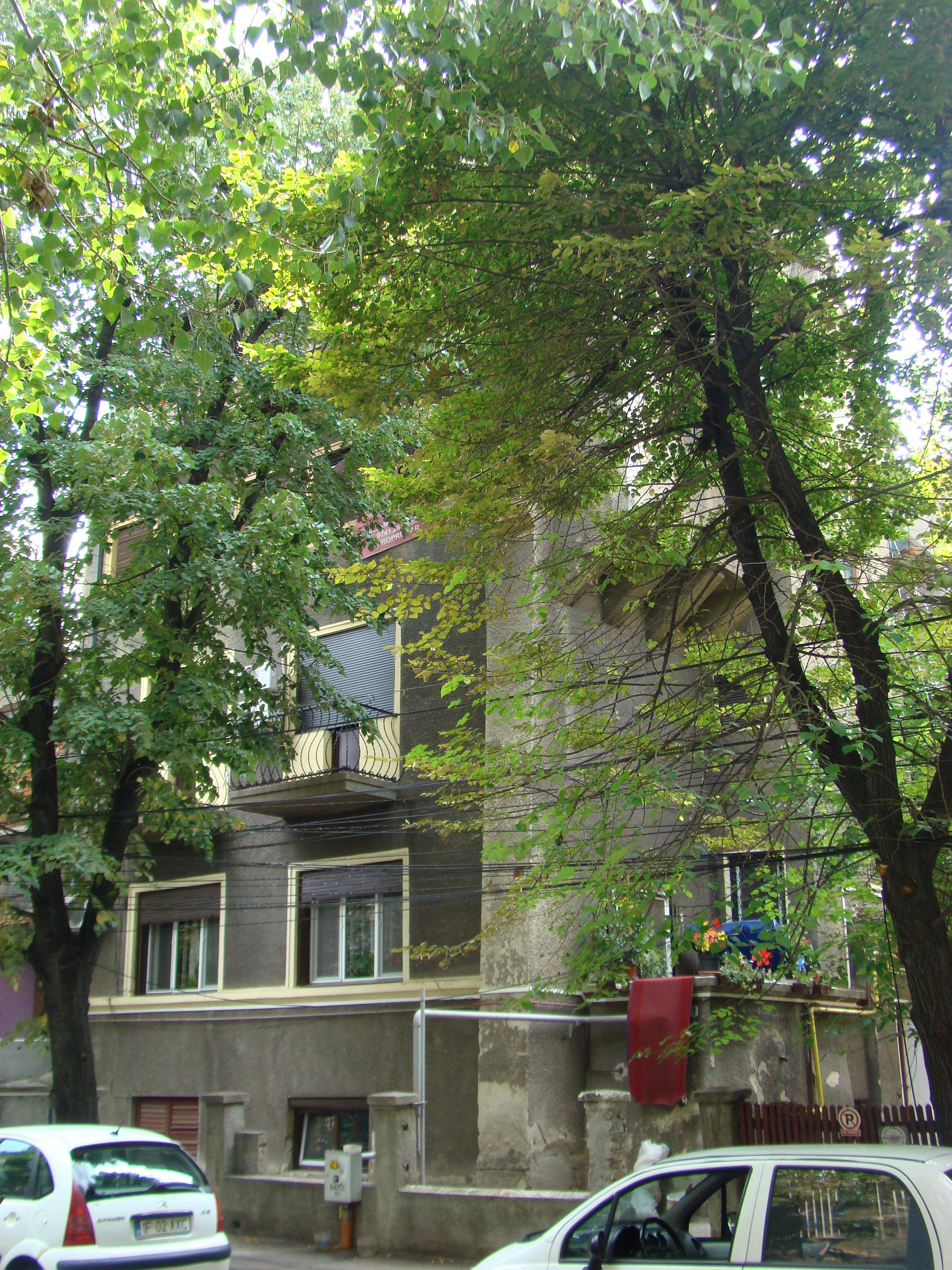 Casă monument istoric, str.Londra, nr. 17